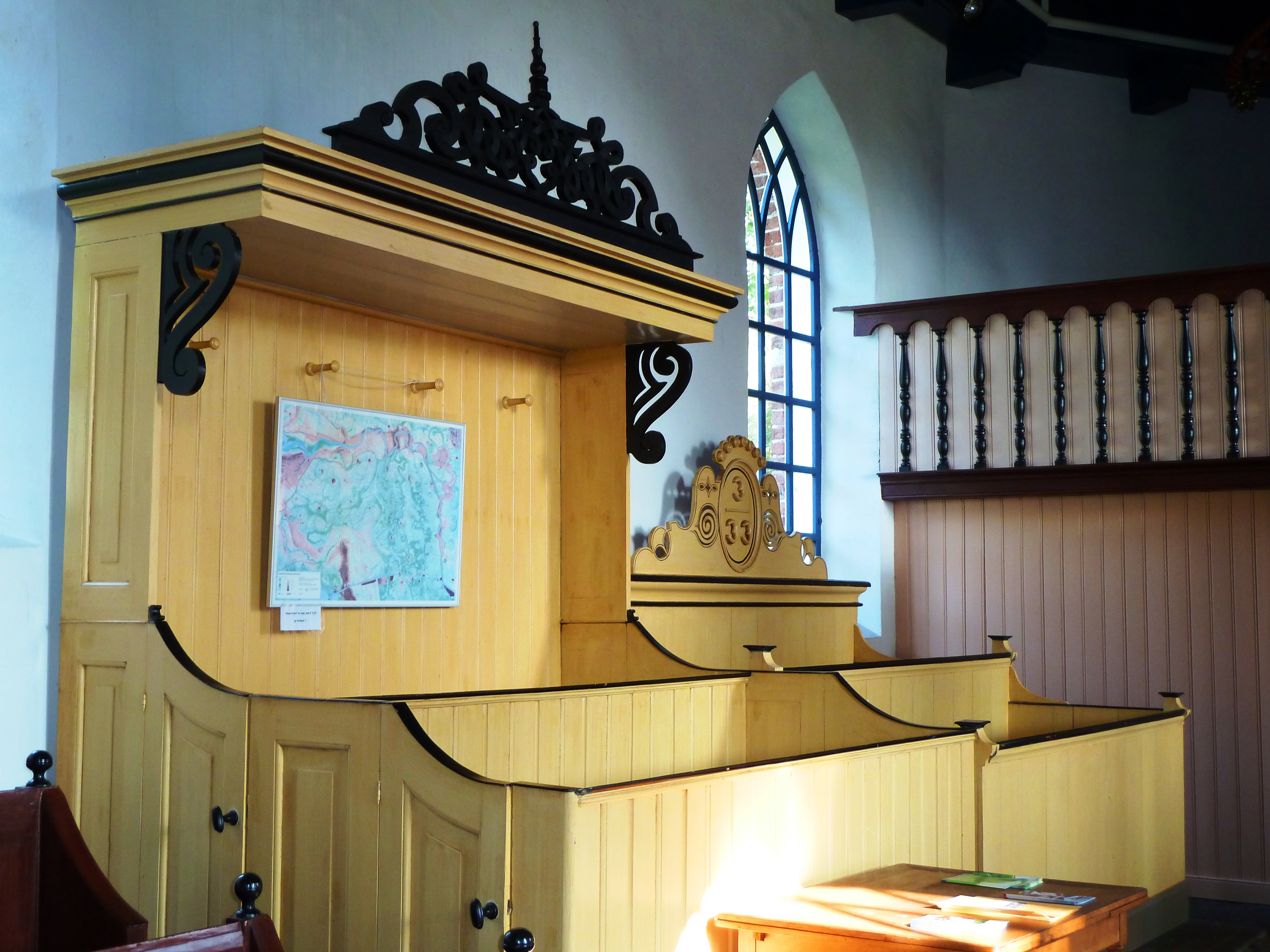 Herenbanken in de kerk van Niehove.